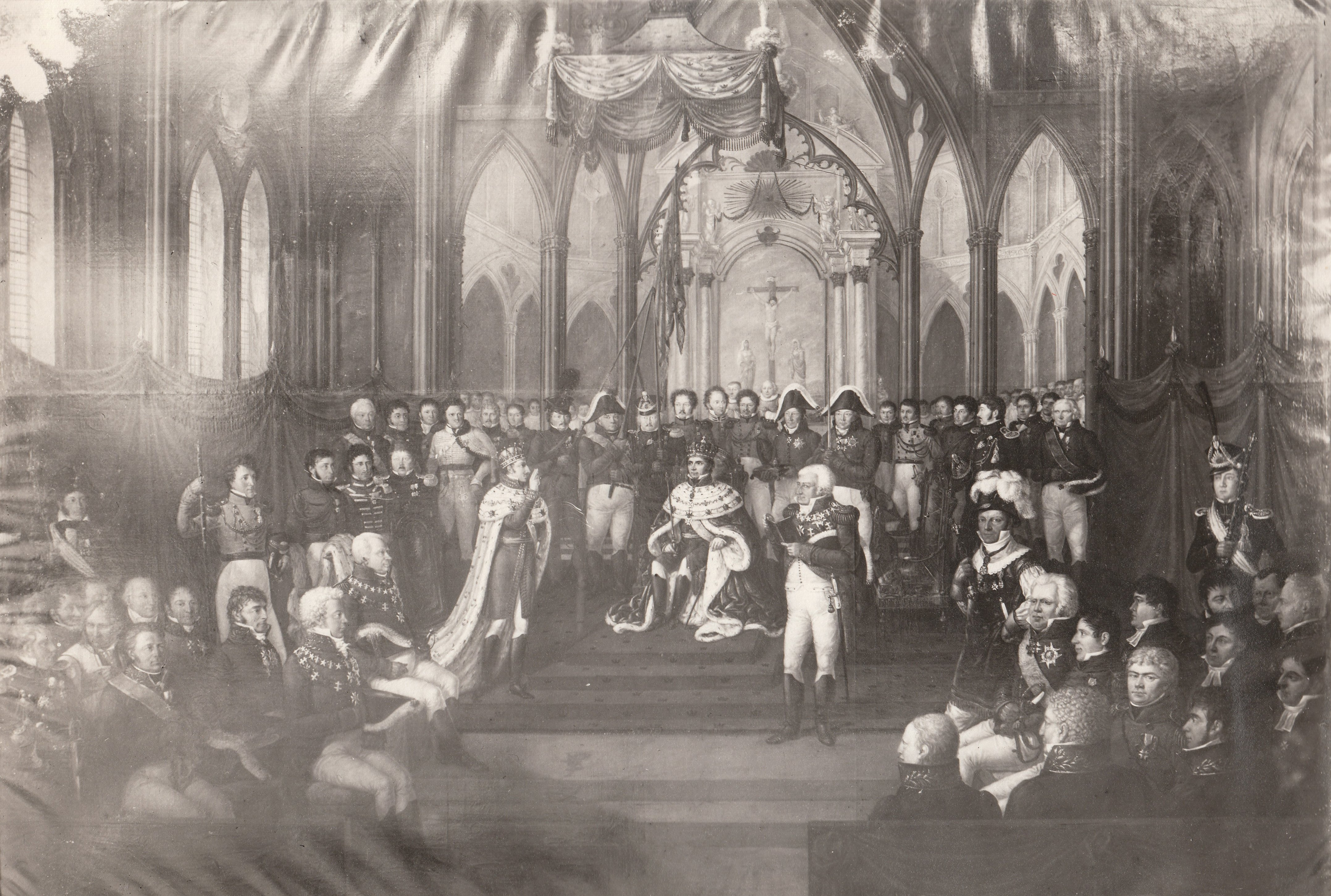 Format: Fotopositiv Dato / Date: 1897 Fotograf / Photographer: Erik Olsen (1835 - 1920) Kunstner / Artist: Johan Munch Sted / Place: Nidarosdomen, Trondheim Eier / Owner Institution: Trondheim byarkiv, The Municipal Archives of Trondheim Arkivreferanse / Archive reference: Tor.H41.B37.F2770 Merknad: Fra utstillingen i anledning Trondhjems 900-årsjubileum i 1897. Merknad: Maleri malt 1822 av Johan Munch (1776 - 1839); originalen henger i slottet i Oslo. Baksiden av bildet har påskrevet henvisning til boken Trondheim Bys Historie, bind 3, side 93. Kroningen av den franske general Jean Baptiste Bernadotte som kong Karl III Johan av Norge i Nidarosdomen, Trondheim 7 september 1818.